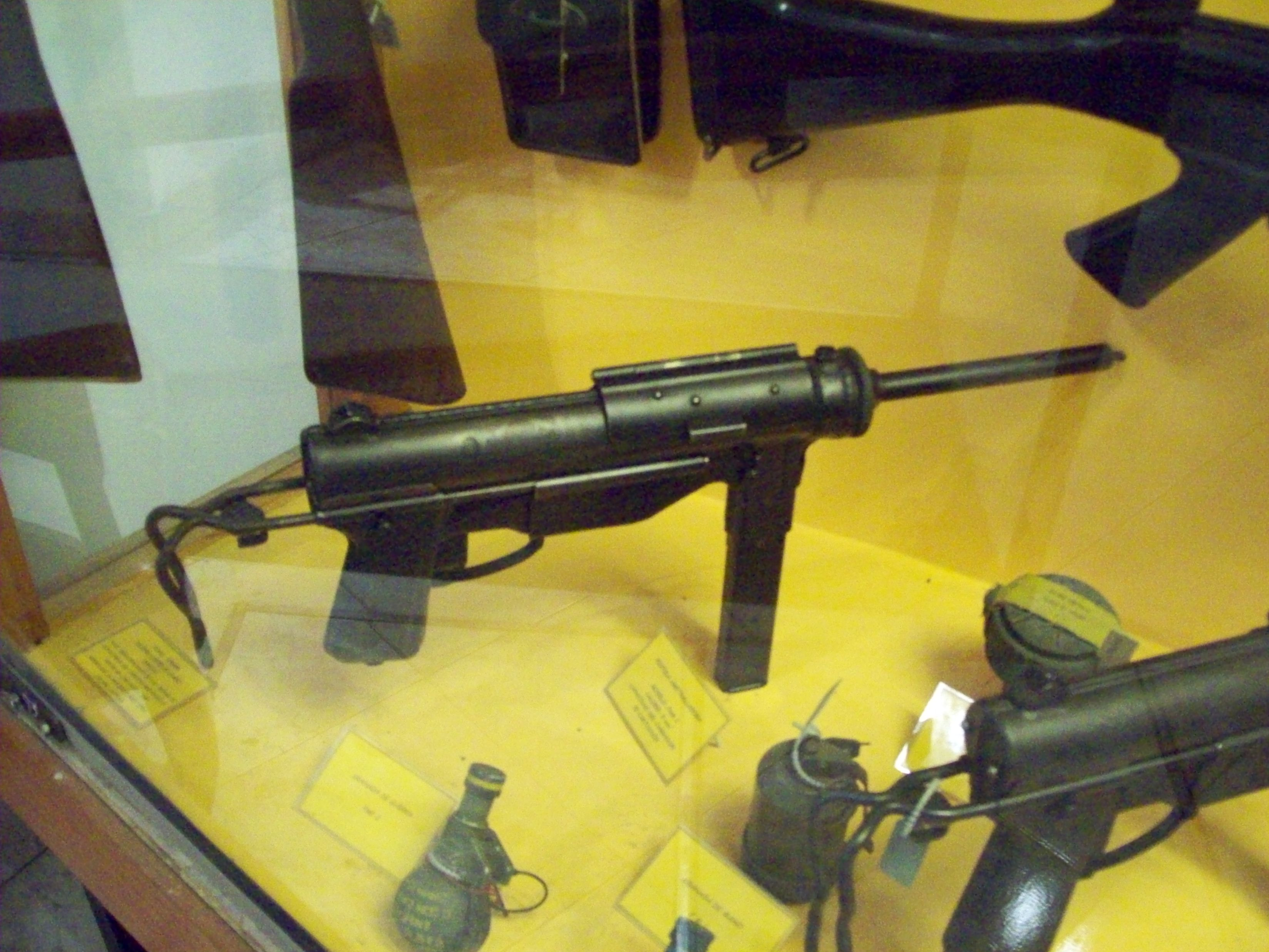 expuesto en el Museo de Armas, ciudad de Buenos Aires, Argentina 2014. PAM 1 (o PAM 2)?